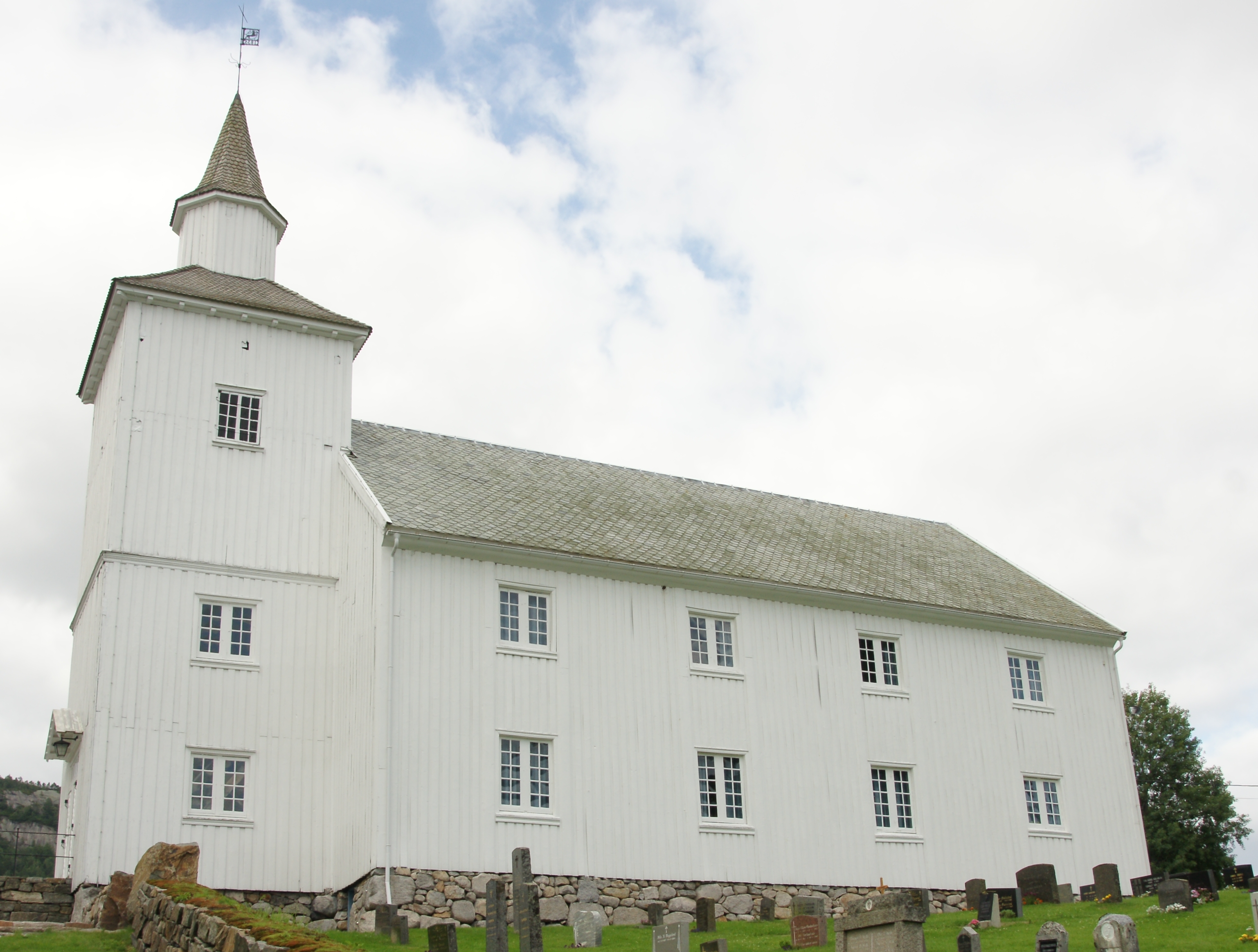 Fjotland kirke